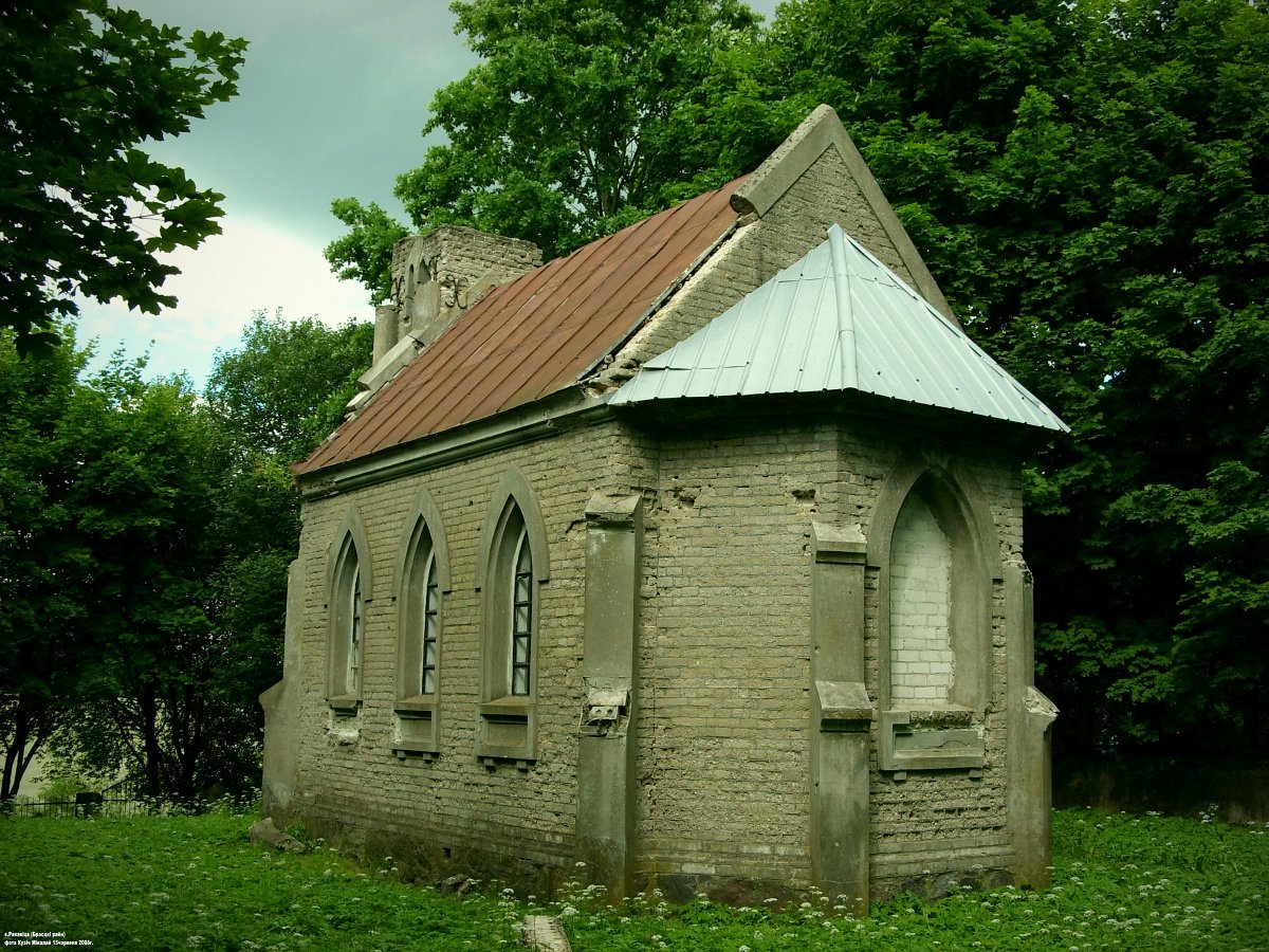 Вялікая Ракавіца. Капліца-пахавальня Талочкаў